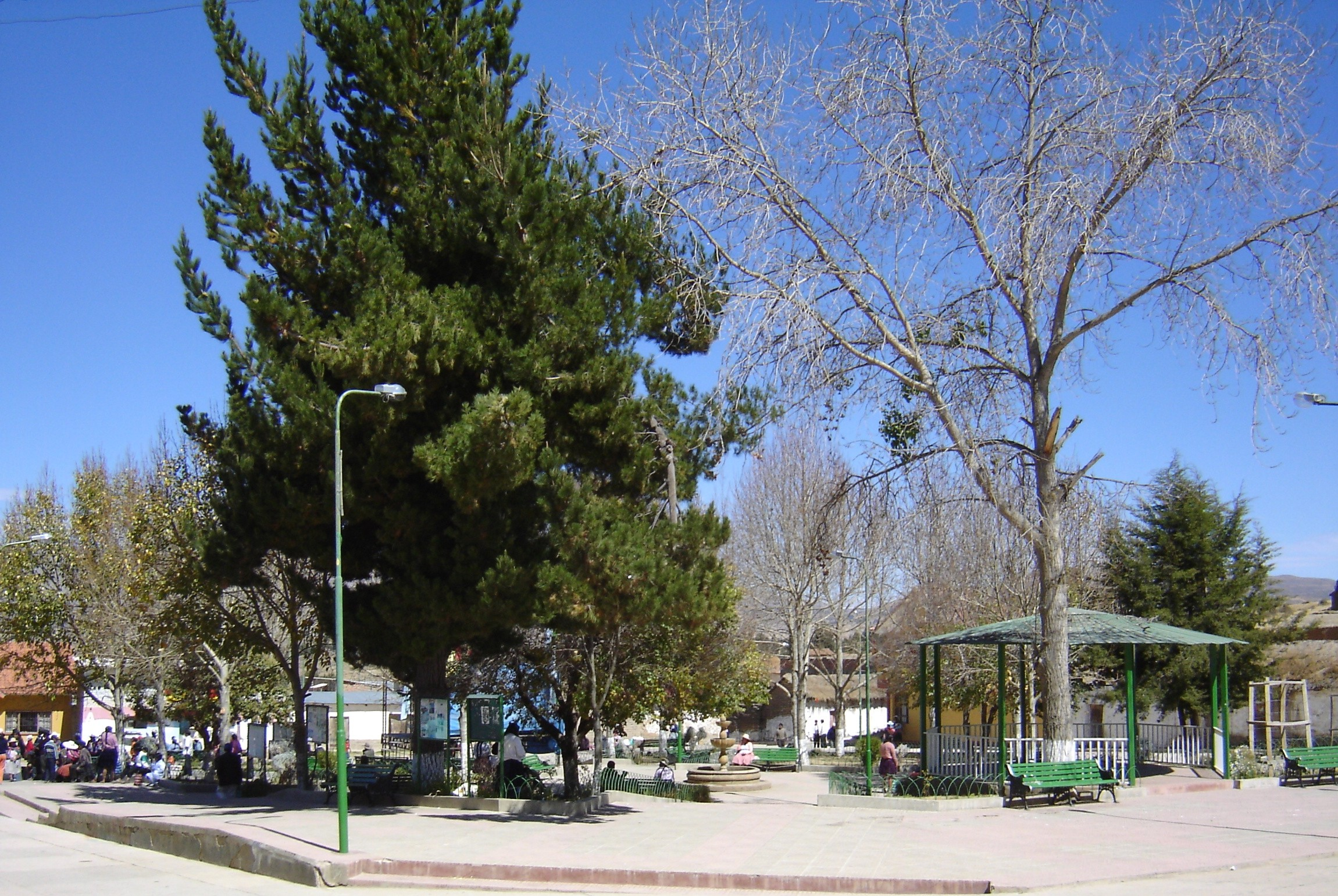 Una vista de la Plaza 4 de diciembre de la Población de Vacas, el día 6 de agosto de 2008.